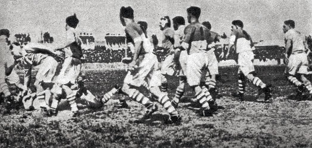 1939 (30 avril), Biarritz (maillot foncé et blanc) de nouveau champion de France de rugby face à l'USAP, au Stade des Ponts Jumeaux de Toulouse.